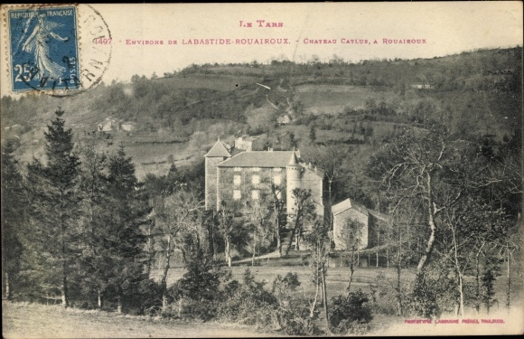 Carte postale du château de Caylus, dans le Tarn